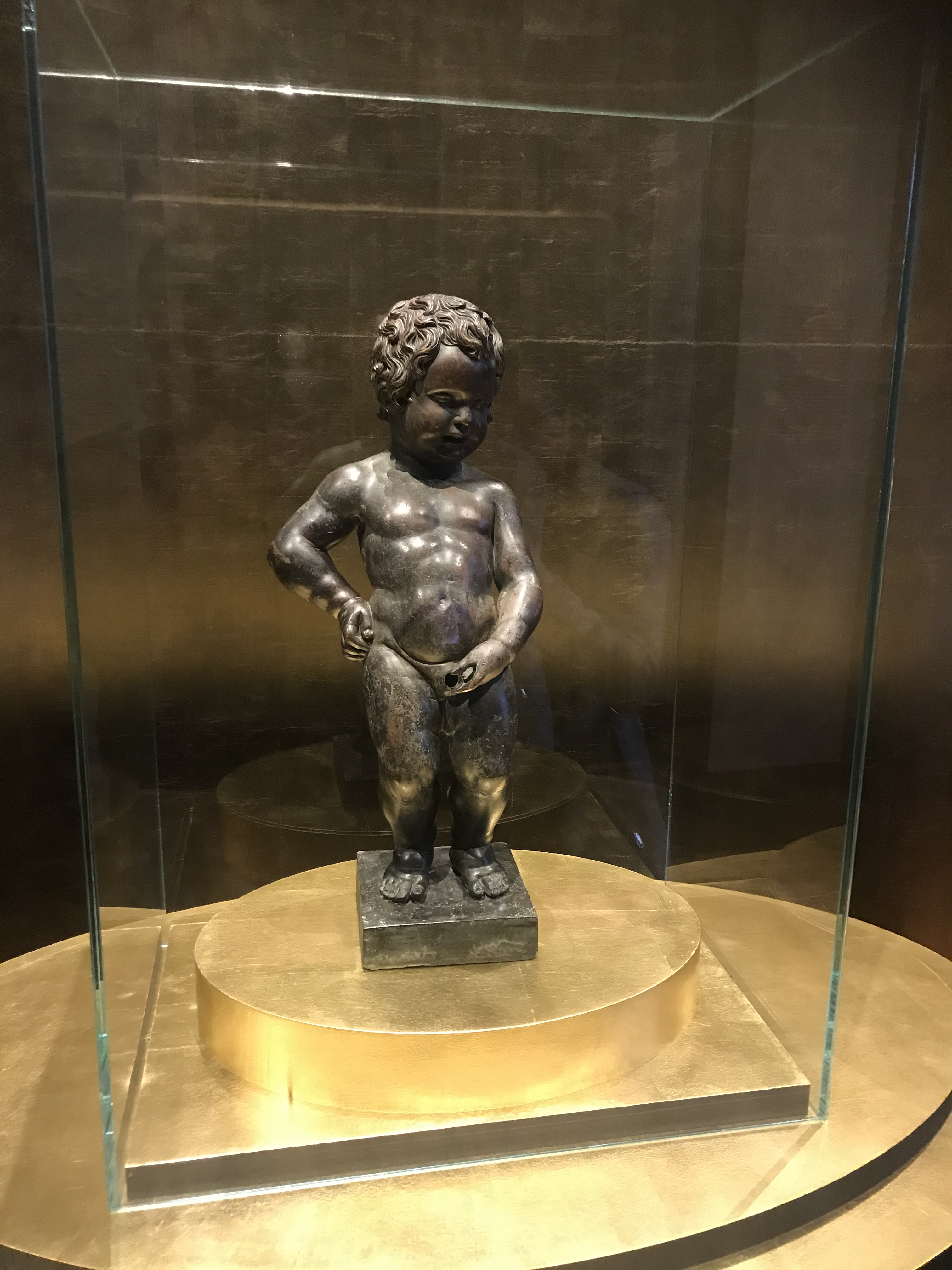 Le Manneken-Pis à Bruxelles, Belgique. La statuette originale en bronze a été créée par Jérôme Duquesnoy l'Ancien, en 1619. L'original étant conservé à la Maison du Roi, musée de la ville de Bruxelles. Celle exposée de nos jours à l'angle des rues de l'Étuve et du Chêne est une réplique datant de 1965